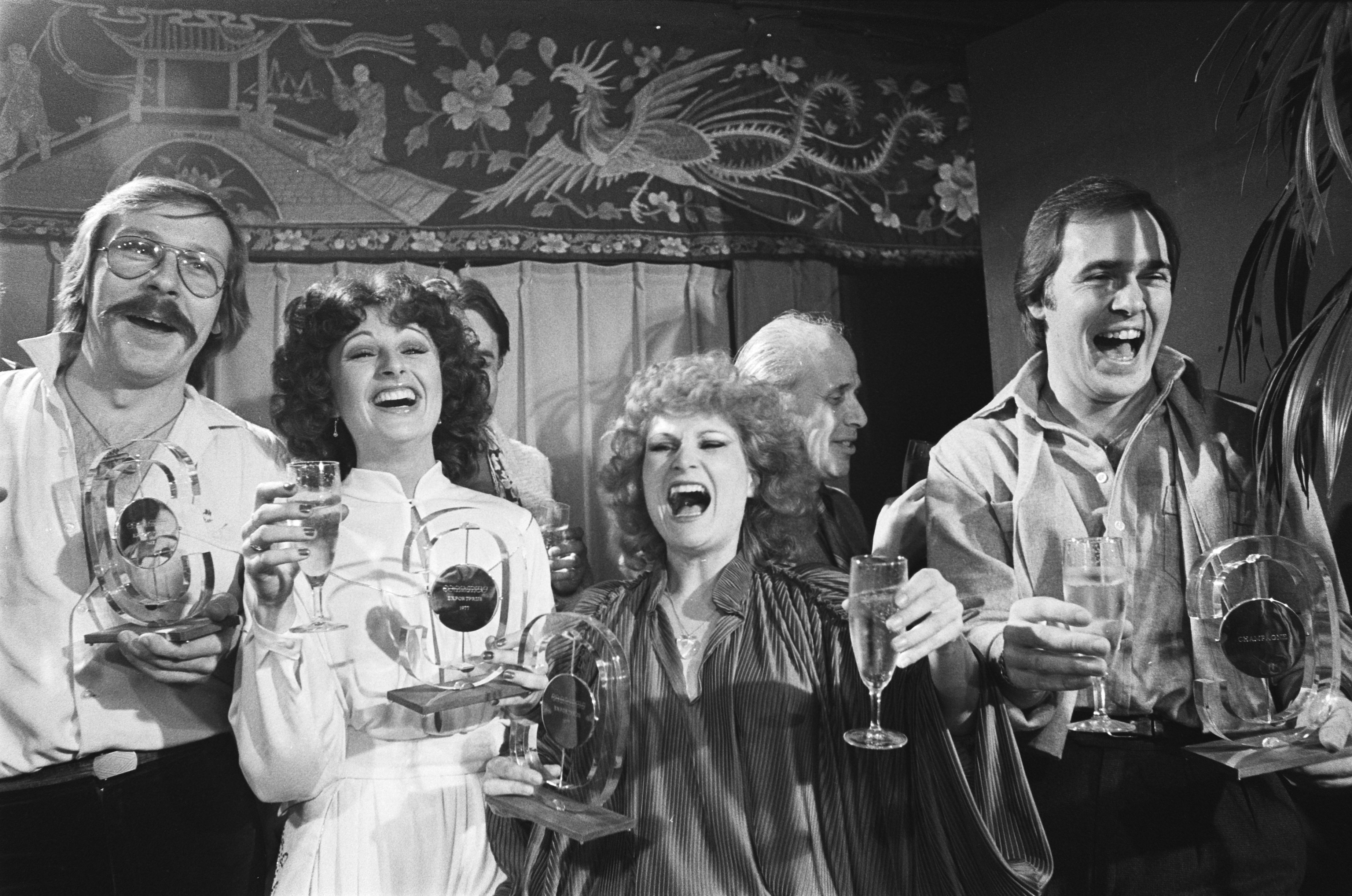 Collectie / Archief : Fotocollectie Anefo Reportage / Serie : [ onbekend ] Beschrijving : Exportprijs 77 voor de groep Champagne uitgereikt in de Suikerhof in Amsterdam Datum : 4 januari 1978 Locatie : Amsterdam, Noord-Holland Trefwoorden : prijzen Fotograaf : Peters, Hans / Anefo Auteursrechthebbende : Nationaal Archief Materiaalsoort : Negatief (zwart/wit) Nummer archiefinventaris : bekijk toegang 2.24.01.05 Bestanddeelnummer : 929-5100 Reacties Geplaatst door Maaike op 08 november 2013 - 22:45. Instellingsnamen: Stichting Conamus Persoonsnamen: (leden van de groep 'Champagne') Paulette Bronkhorst, Trudie Huijsdens, Jan Vredenburg, Bert van de Wiel NB. Martin Duiser, Piet Souer en Wally Tax ontvingen ook de Conamus Exportprijs 1977